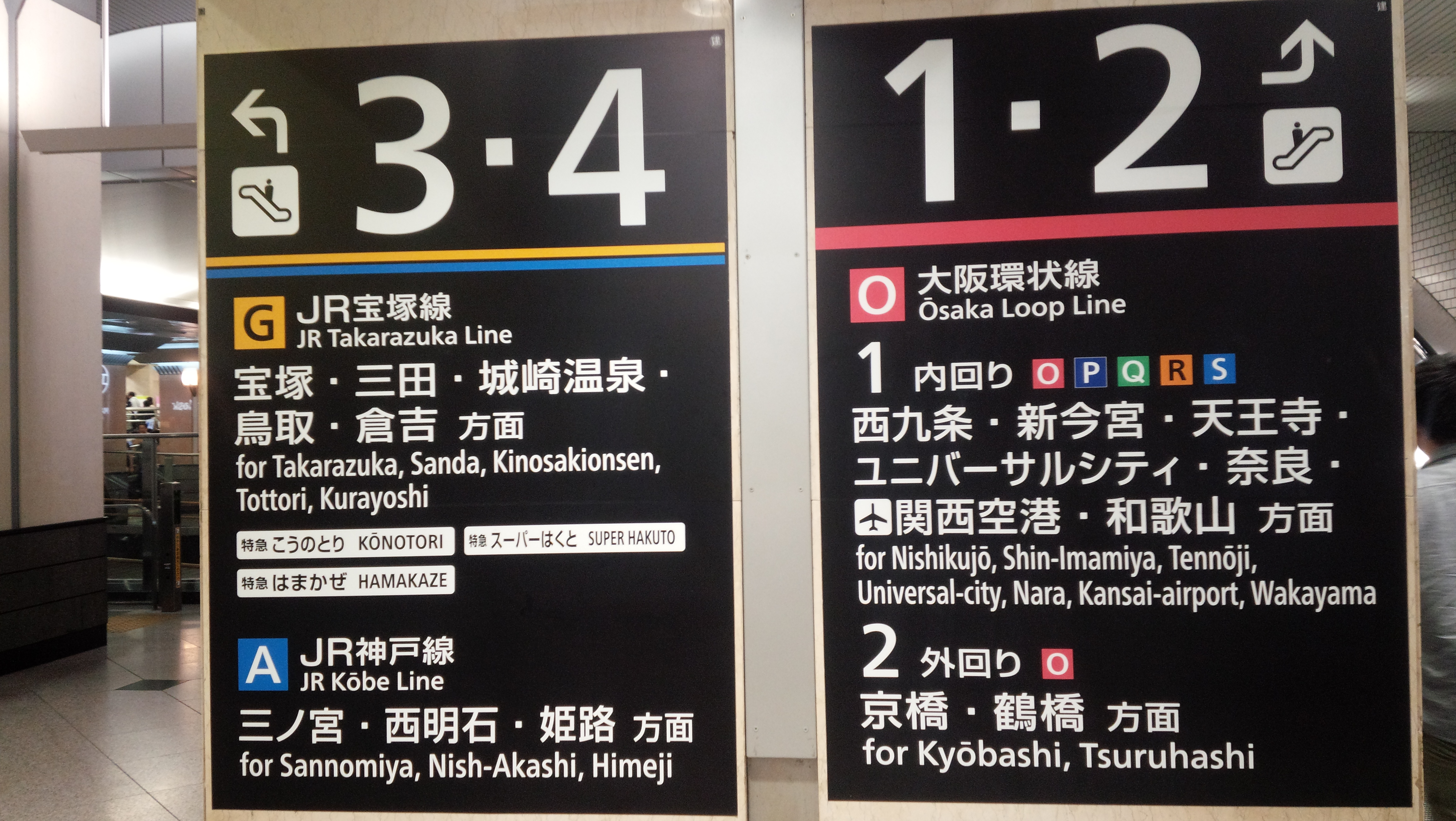 西日本旅客鉄道（JR西日本）近畿エリアの路線記号入り案内標（大阪駅中央口改札内コンコース）